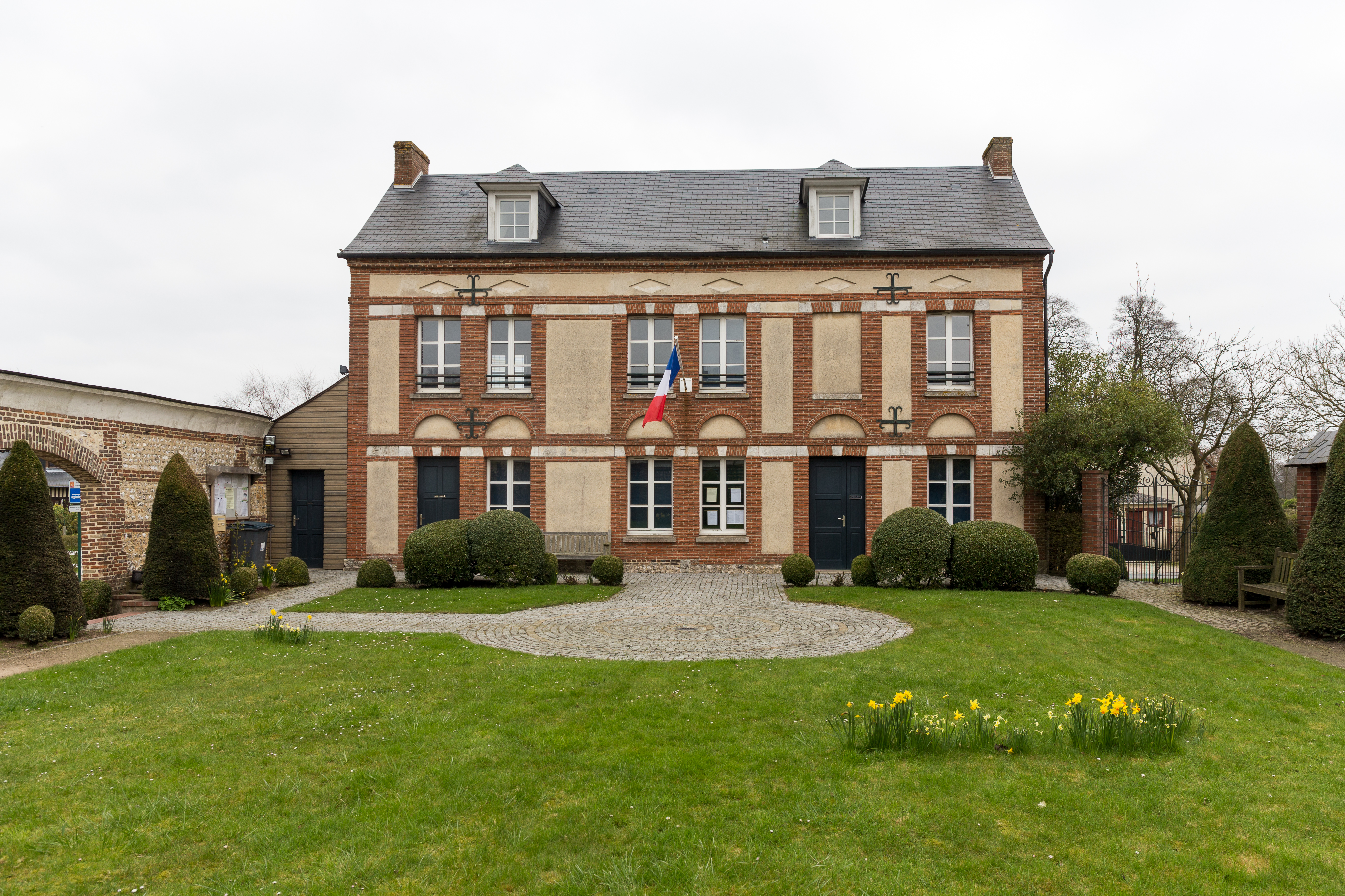 Mairie d'Auberville-la-Campagne, ancien presbytère.